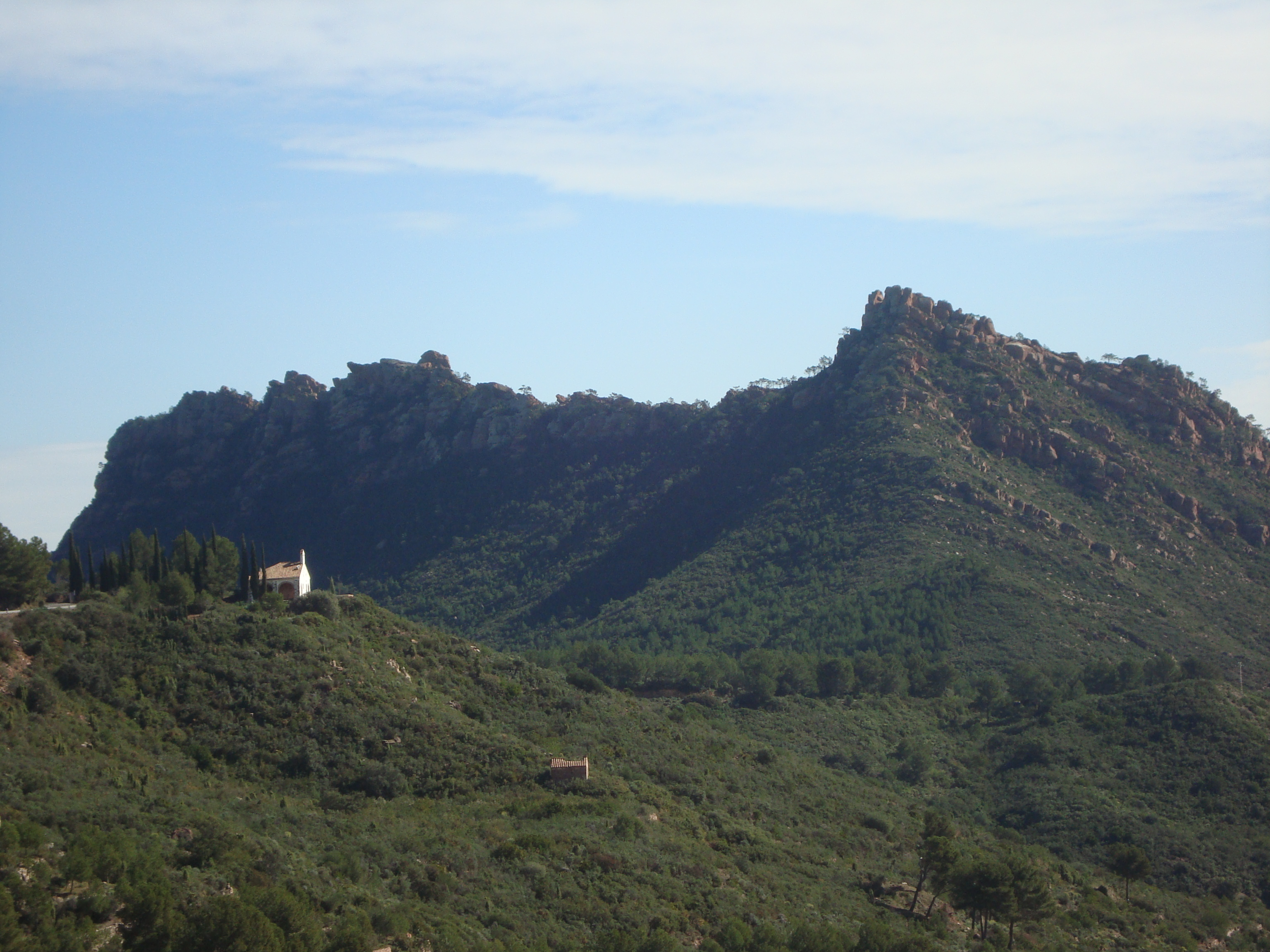 Parque Natural del Desierto de Las Palmas en Castellón This is a photography of a Special Area of Conservation in Spain with the ID: ES5221002. Natura2000 entry, EEA entry